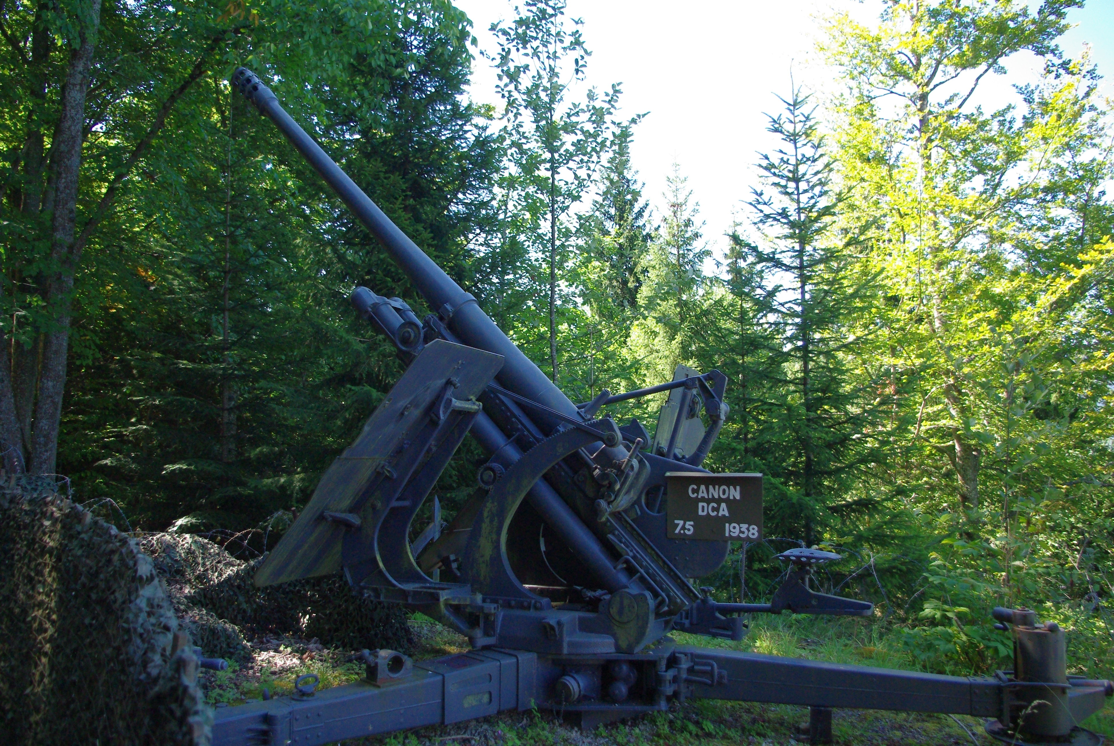 Canon de DCA 7.5 de 1938 au fort de Pré-Giroud lors de la sortie photo du 18-08-2012